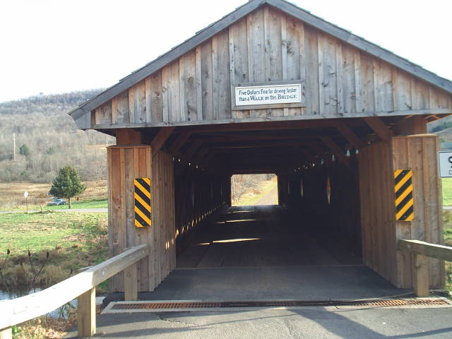 M3367S-4504